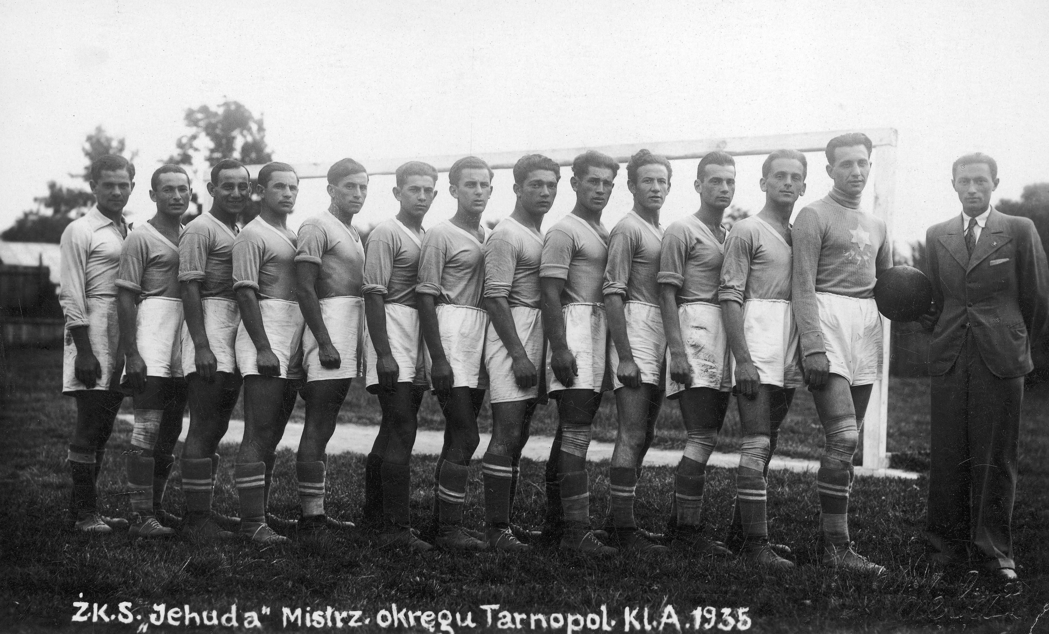 Футбольна команда Жидівського спортового клубу "Єгуда" Тернопіль